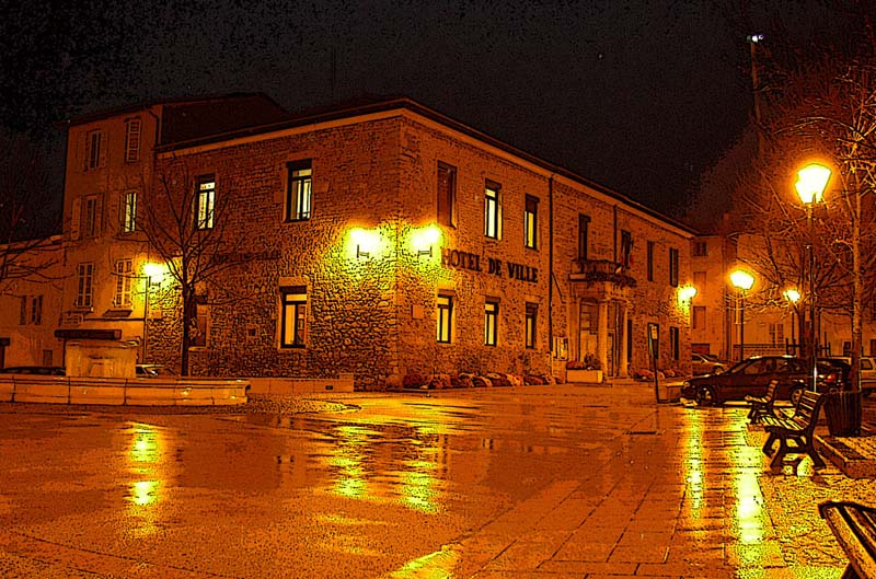 Hôtel de ville d'Ambérieu-en-Bugey.